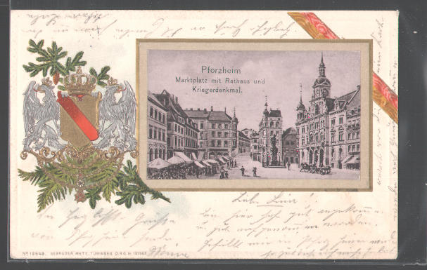 Ansichtskarte von Pforzheim: Marktplatz mit Rathaus Kriegerdenkmal